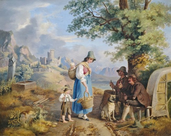 Tirolerin mit ihren Kindern auf dem Nachhauseweg vom Markt im Gespräch mit Bauern. Im Hintergrund weite Gebirgslandschaft